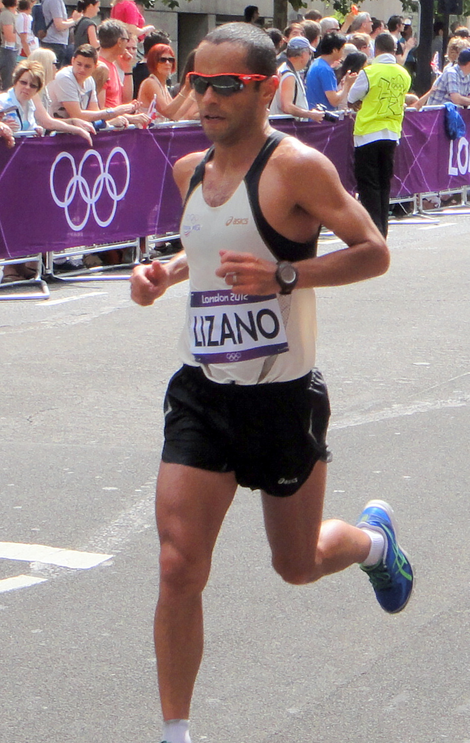 Cesar Lizano (Costa Rica) & Pedro Mora (Venezuela) - London 2012 Men's Marathon